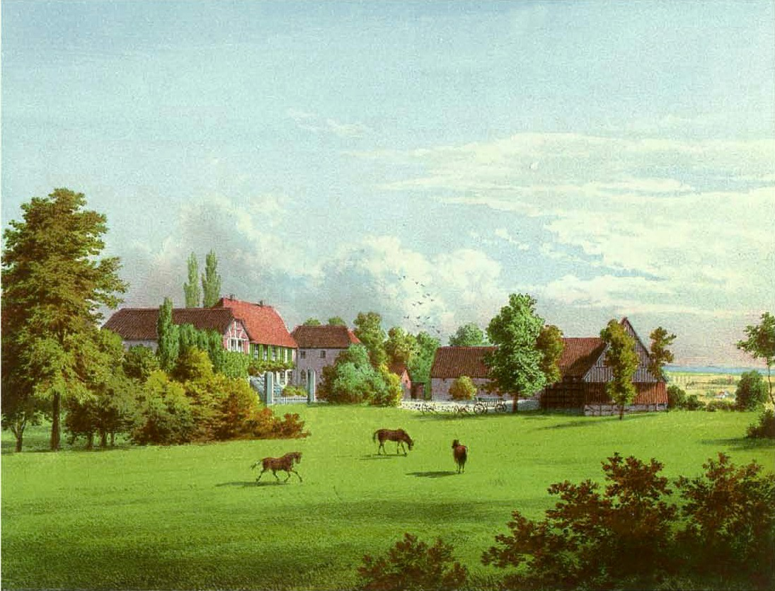 Haus Schafhausen (auch Schaffhausen), Kreis Soest